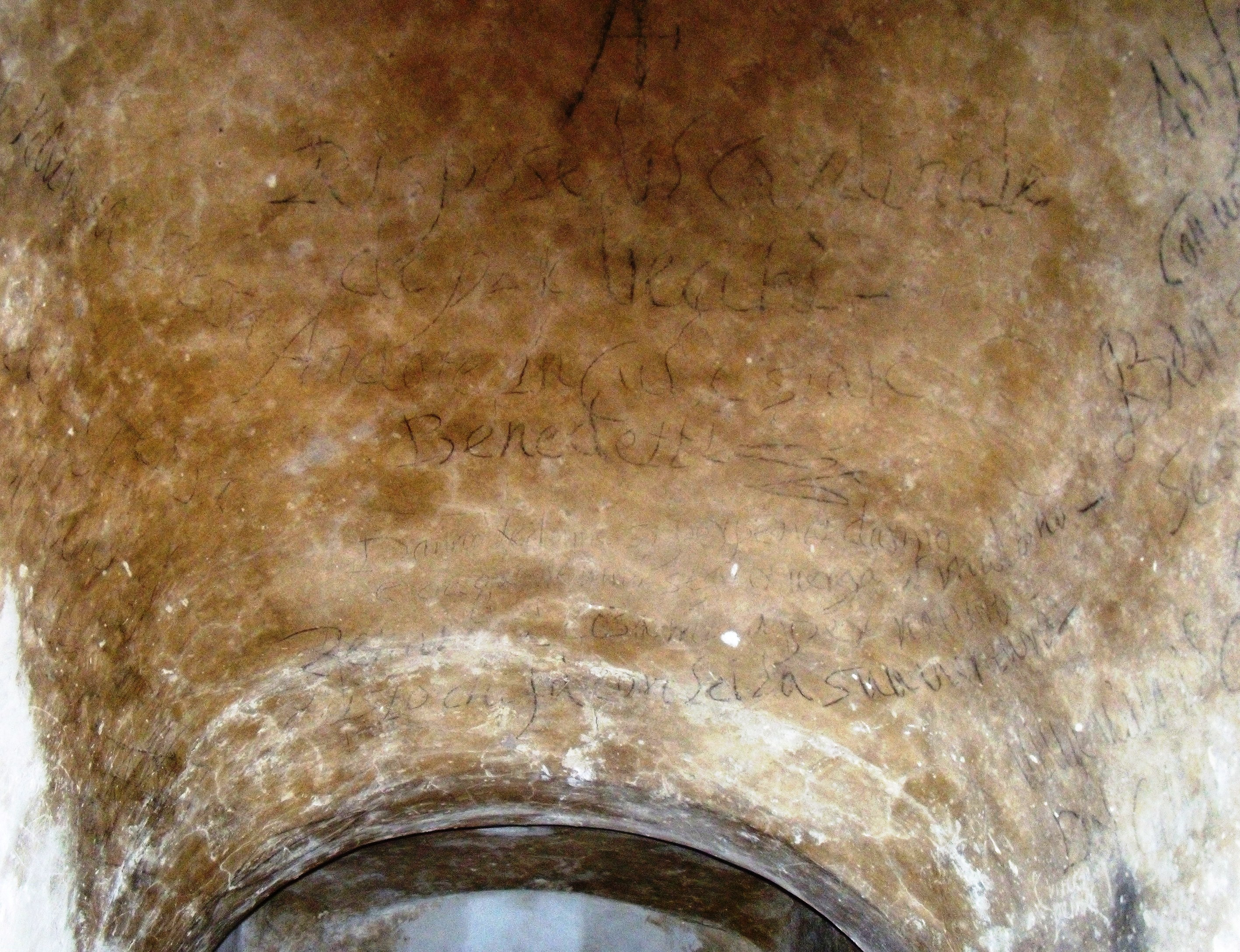 Particolare della volta di una cella delle carceri feudali di Cerreto Sannita.